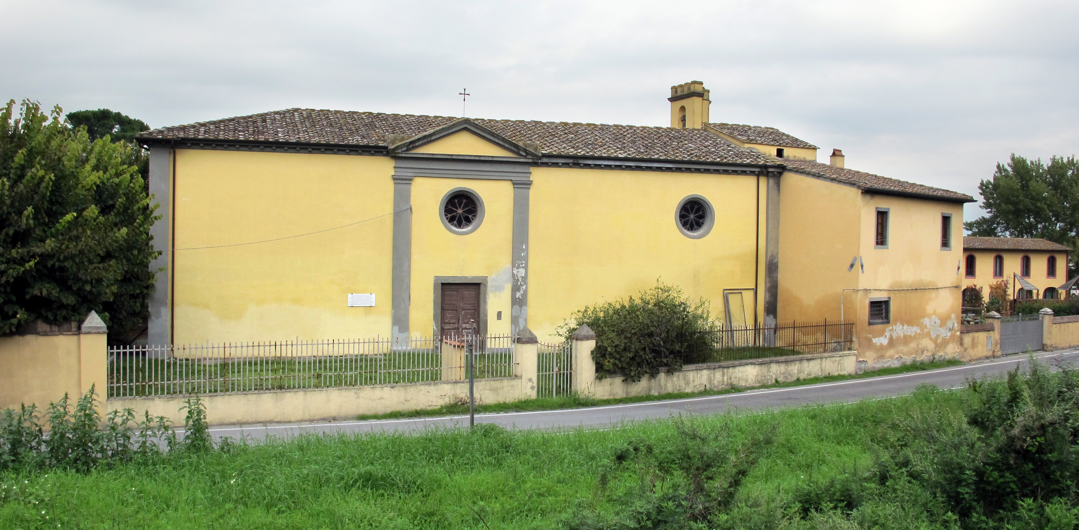 chiese di San Miniato